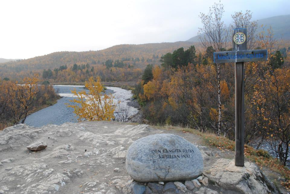 Kungsleden, första meditationsplatsen